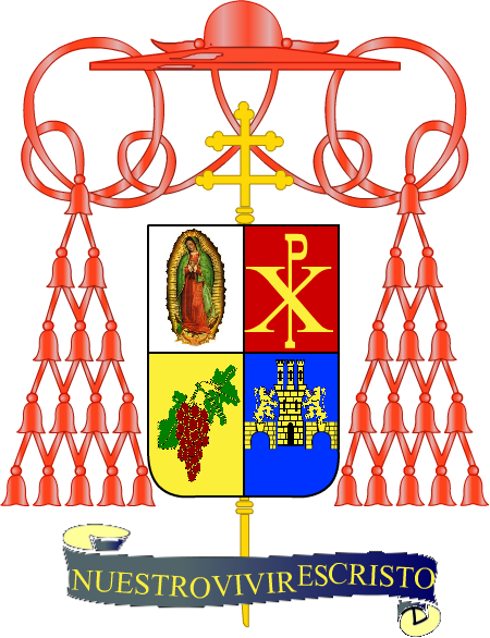 Escudo del cardenal Ernesto Corripio